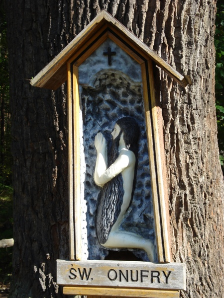 Dąb Onufry wraz z wizerunkiem Św. Onufrego niedaleko Bucza.